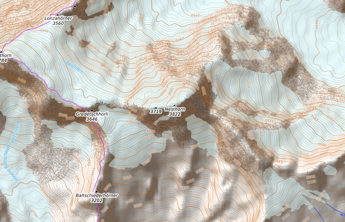 carte réalisée sur umap This map may be incomplete, and may contain errors. Don't rely solely on it for navigation.